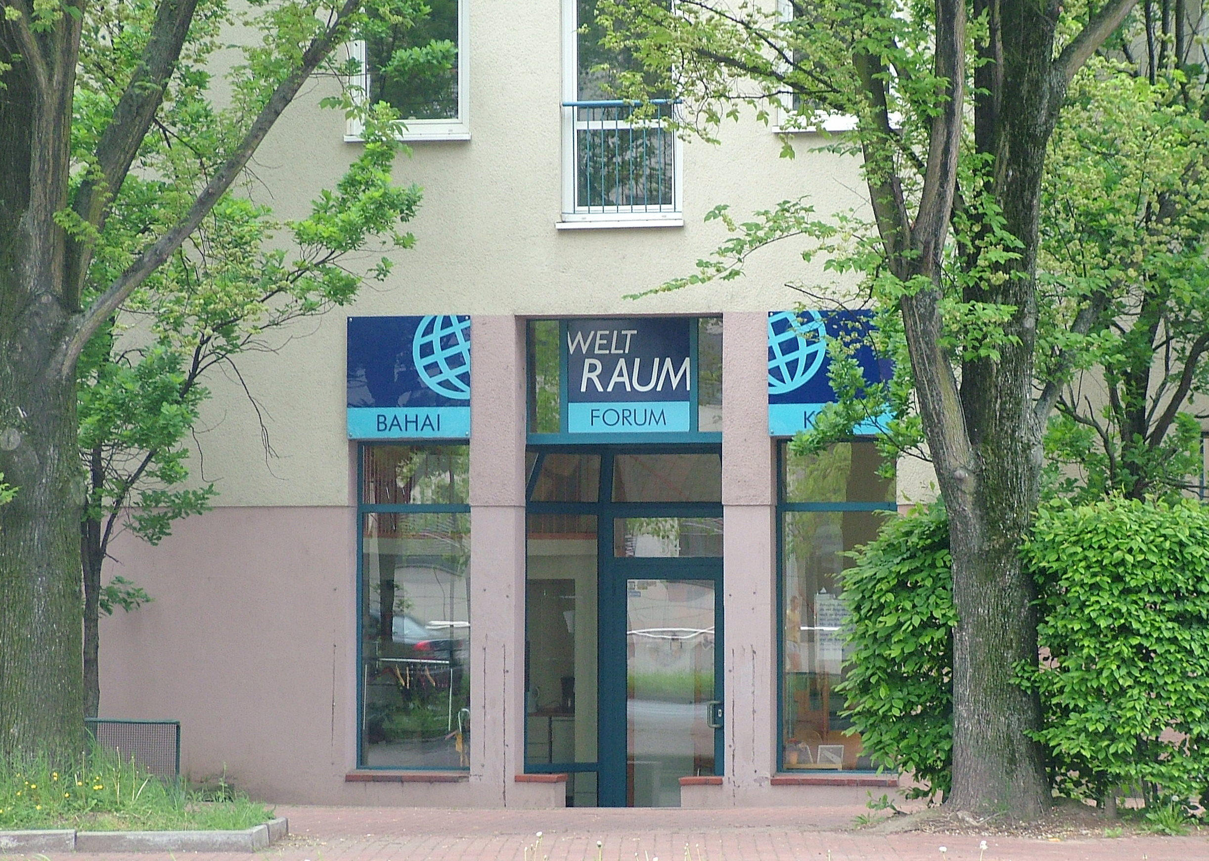 Köln: Bahai-Forum im Severinsviertel.